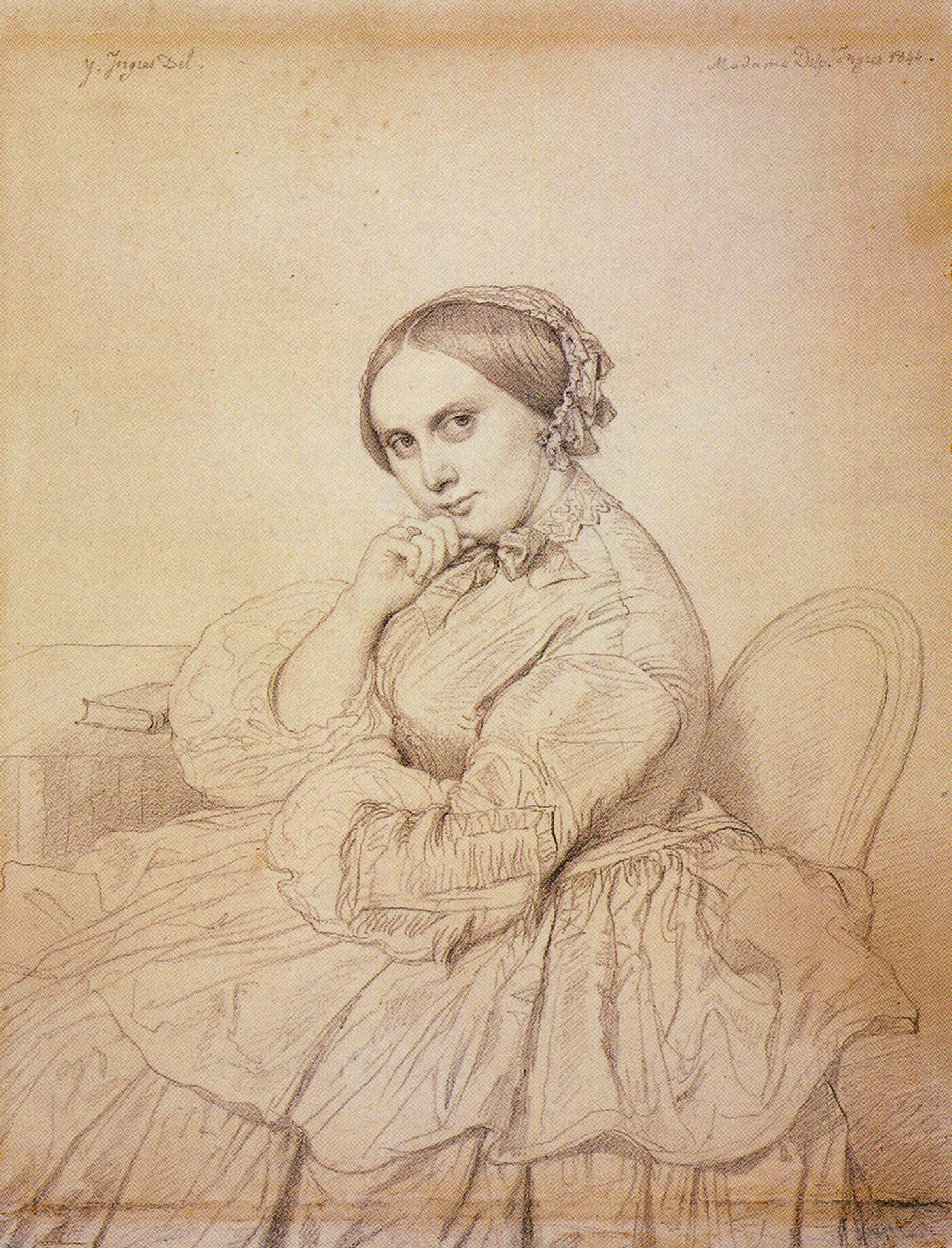 Ingres, portrait de Delphine Ramel future épouse de l'artiste, en 1852, dessin conservé au musée Bonnat de Bayonne